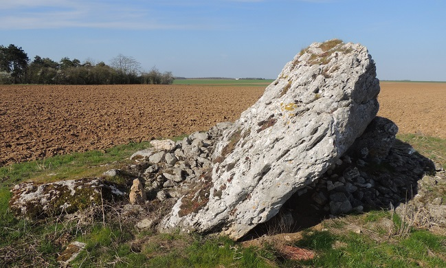 Dolmen de la grosse pierre: table penchée par terre à gauche et sur un orthostat couché (dans l'ombre)à droite. D'autres pierres apparentes . Herbe autour sur 1 à 2 m puis champs labouré à l'arrière et enfin petit bosquet à l'horizon